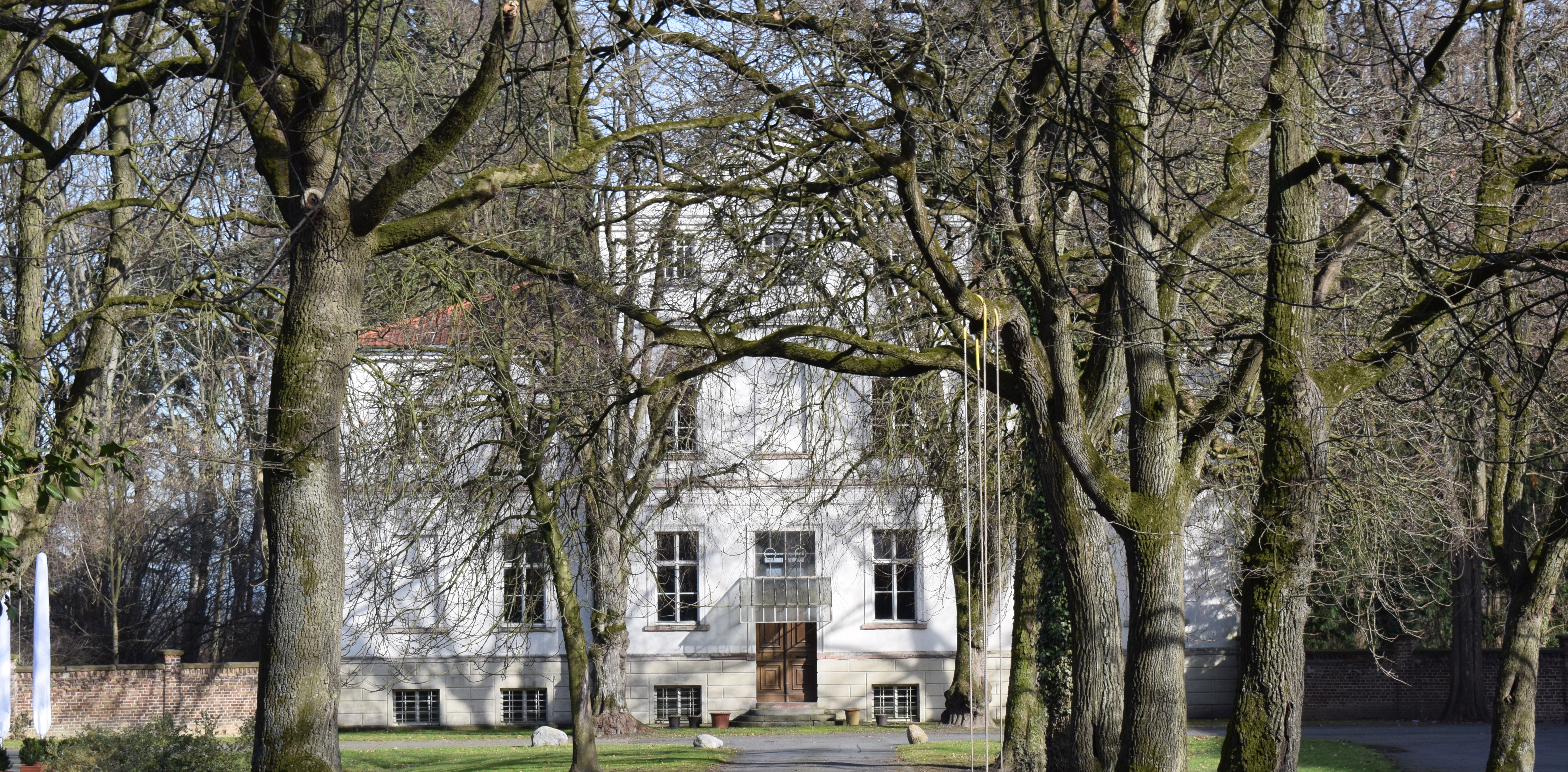 Haupthaus von Gut Ringelsbruch in Paderborn-Elsen